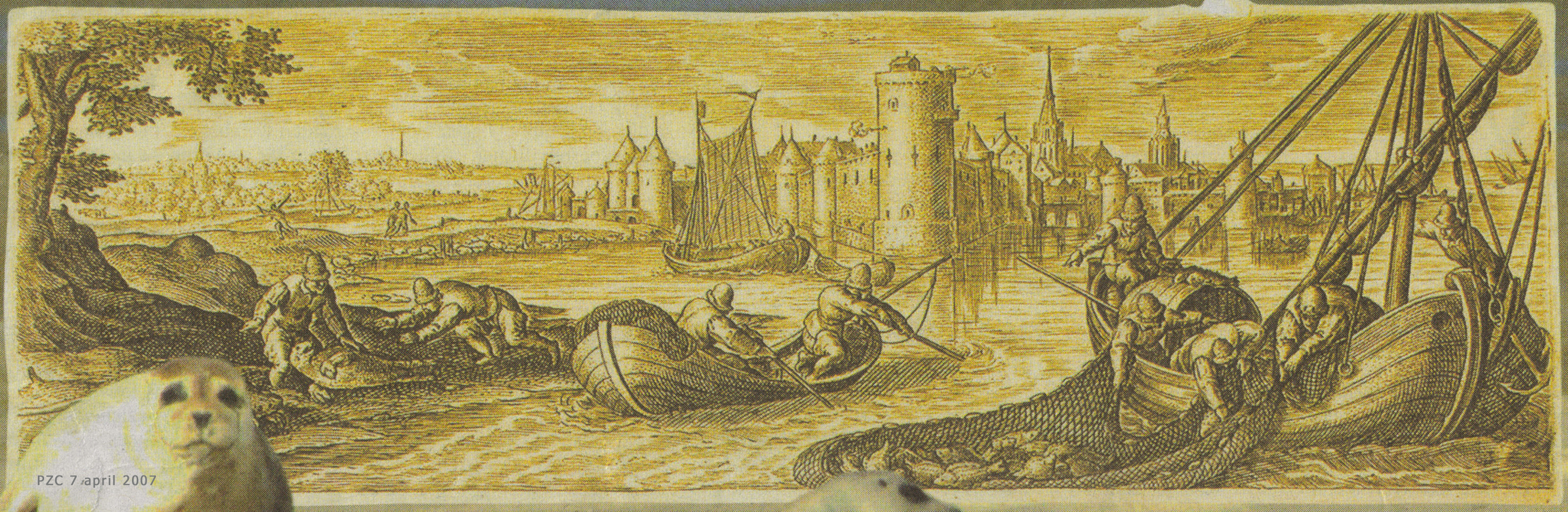 Prent van zeehondenvangst in de buurt van Reimerswaal